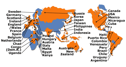 Карта Конгрегации Святейшего Сердца Иисуса